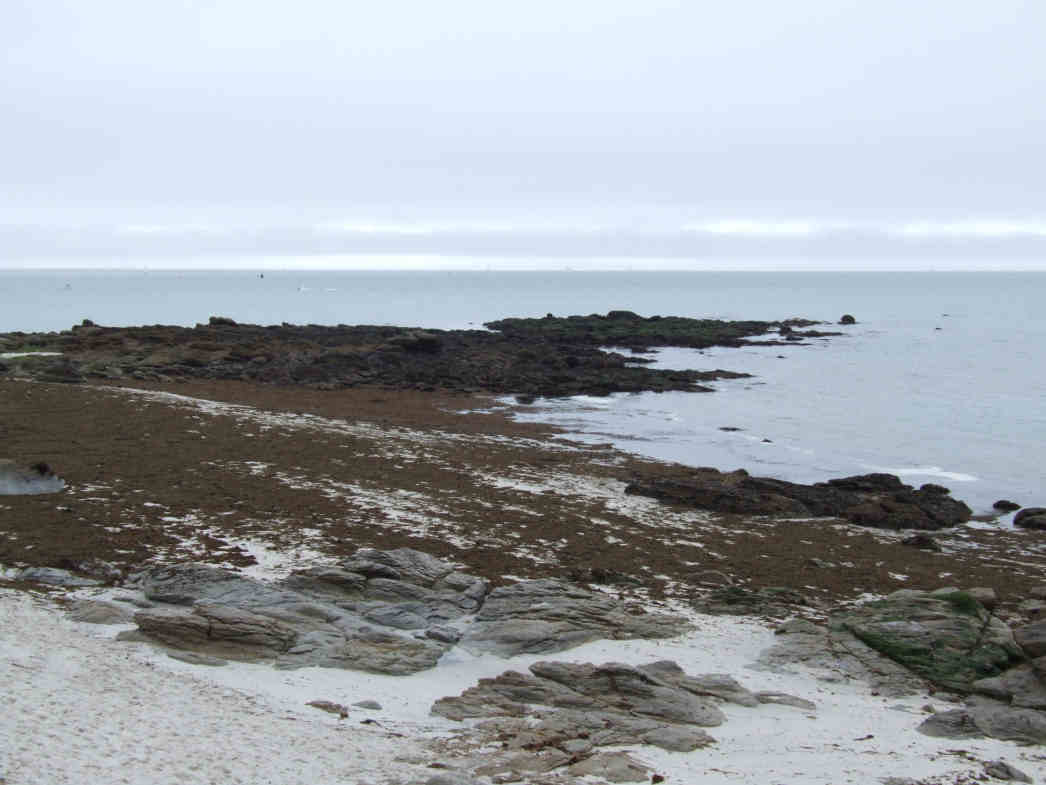 Photo prise par moi-même le 26 mai 2006